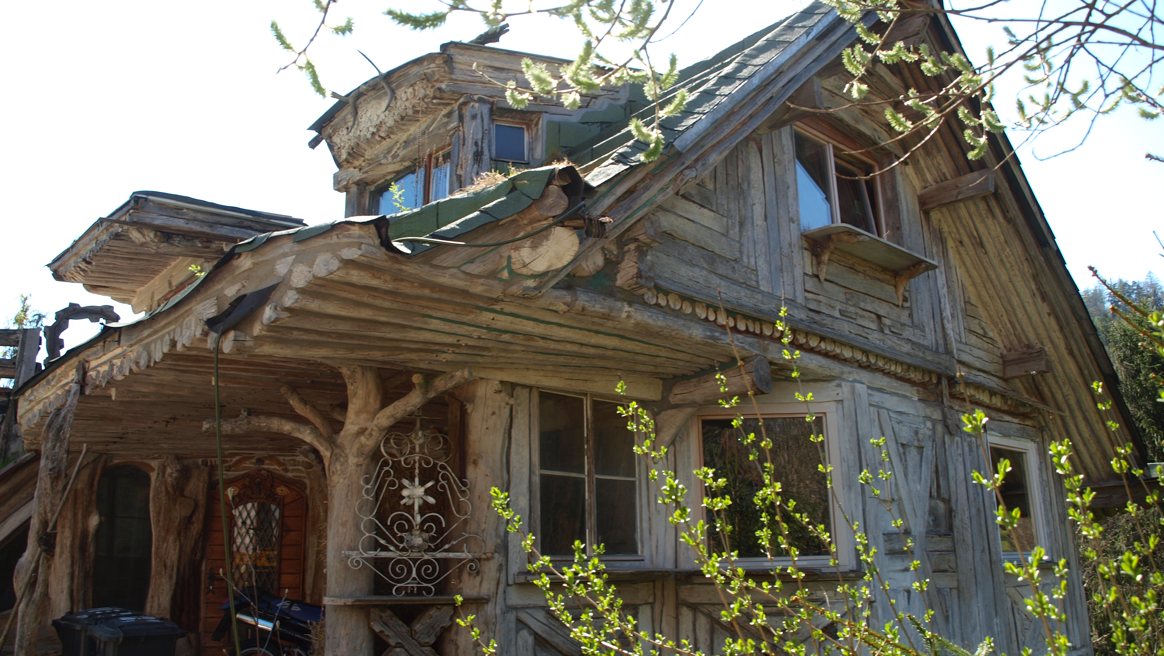 Nassach, Nassachtal - Diegelsberg, alternatives Holzhaus, Glashüttenweg